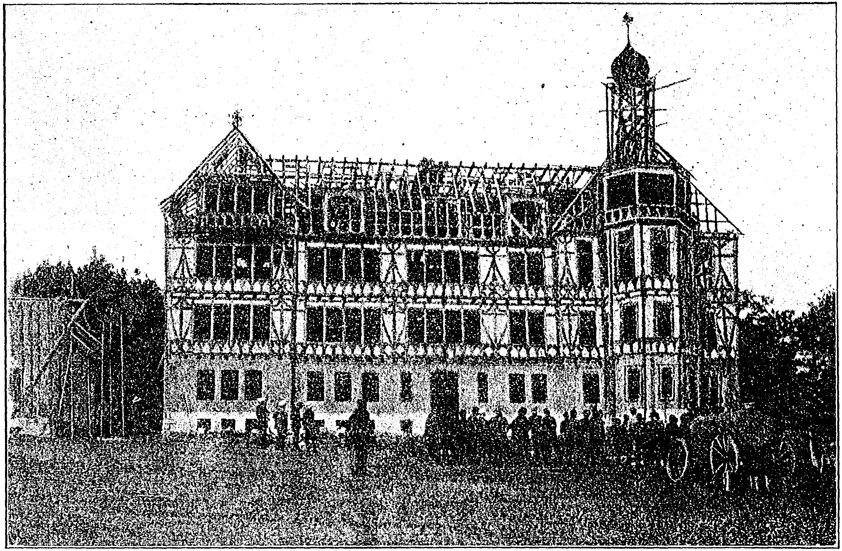 Richtfest für das Hauptgebäude des Deutschen Landeserziehungsheims (D. L. E. H.) Haubinda, 1901.